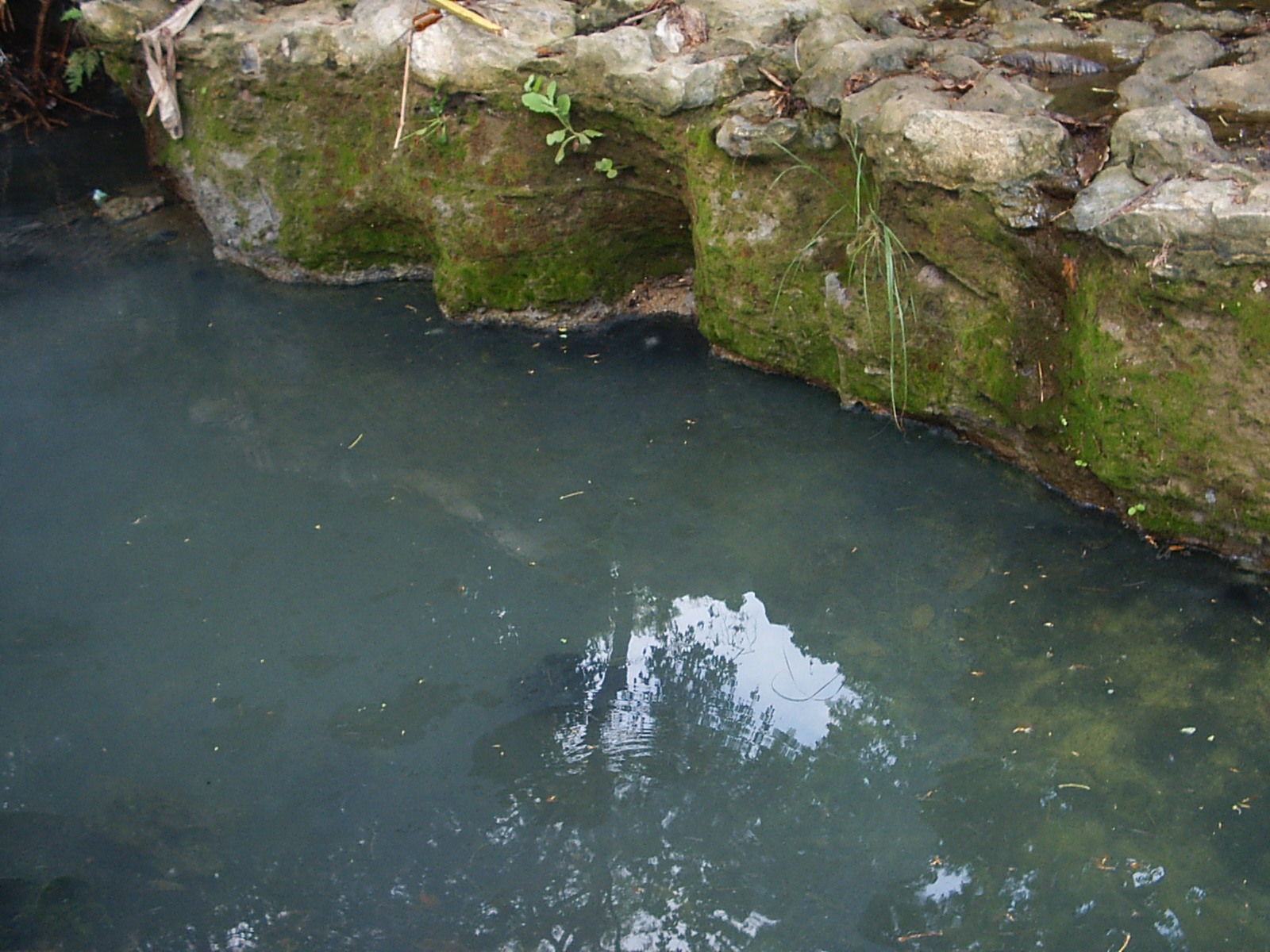 El Azufrado